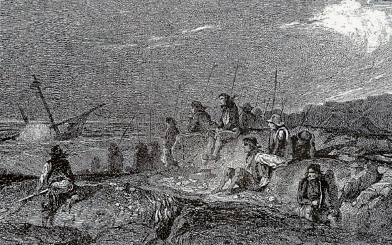 Les pilleurs de la mer